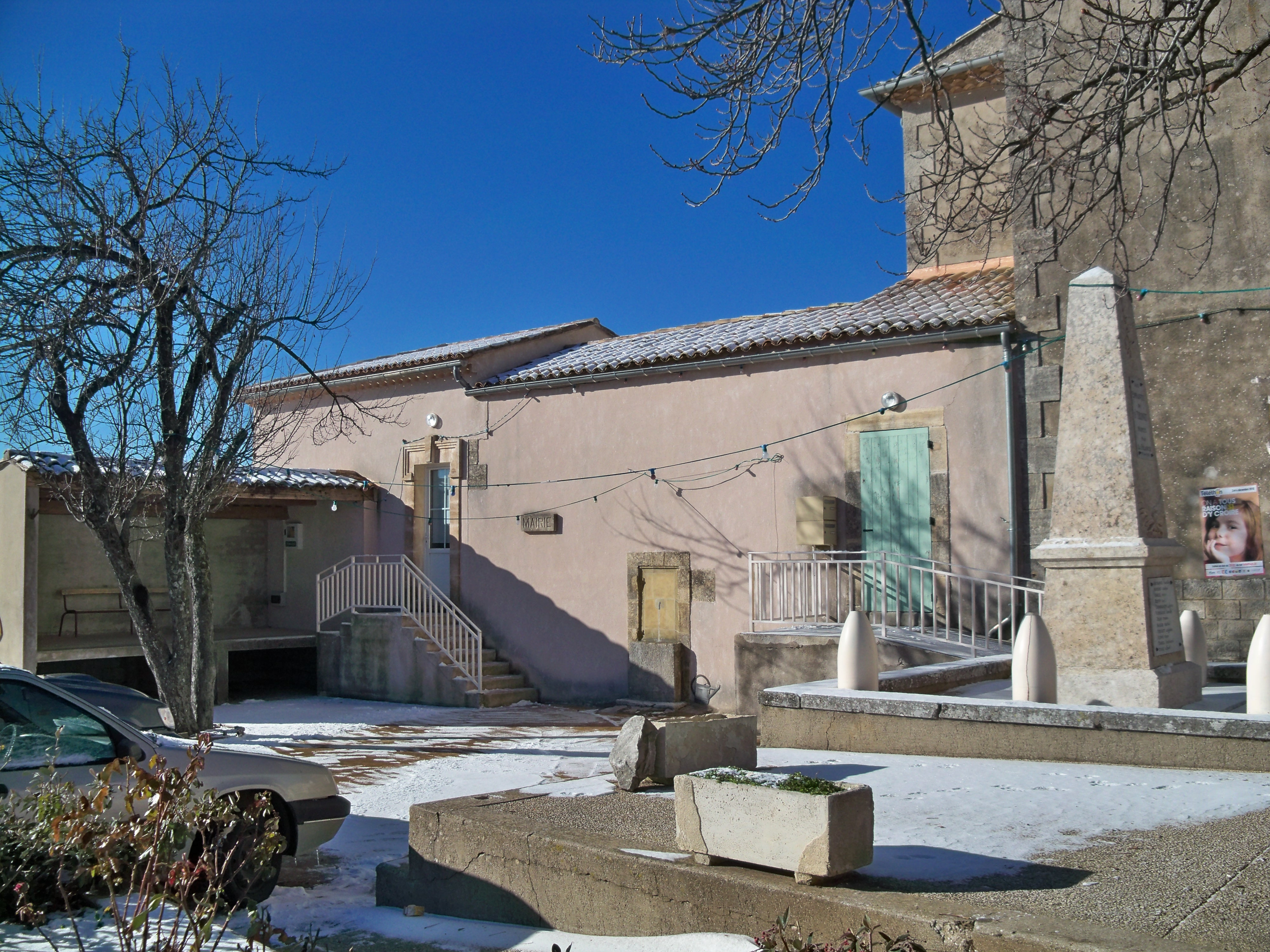 Mairie de Saint Trinit, Vaucluse, France